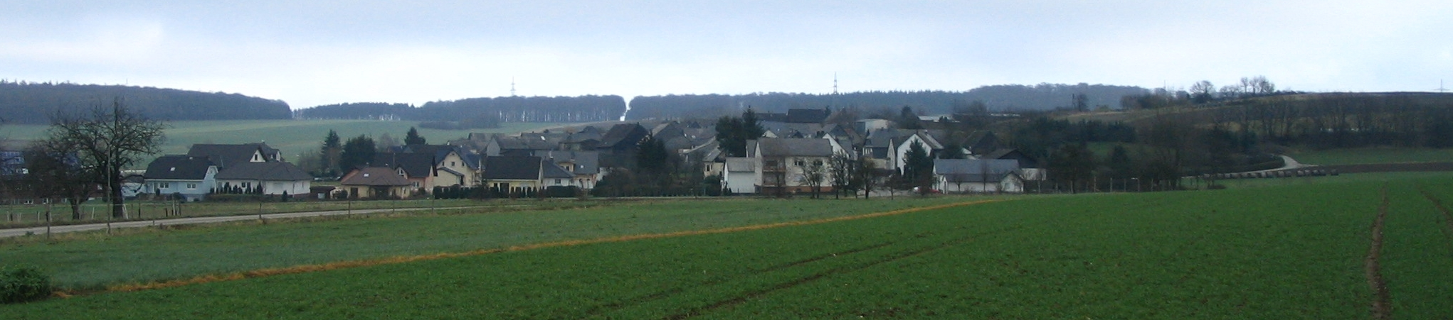 Haserich im Hunsrück